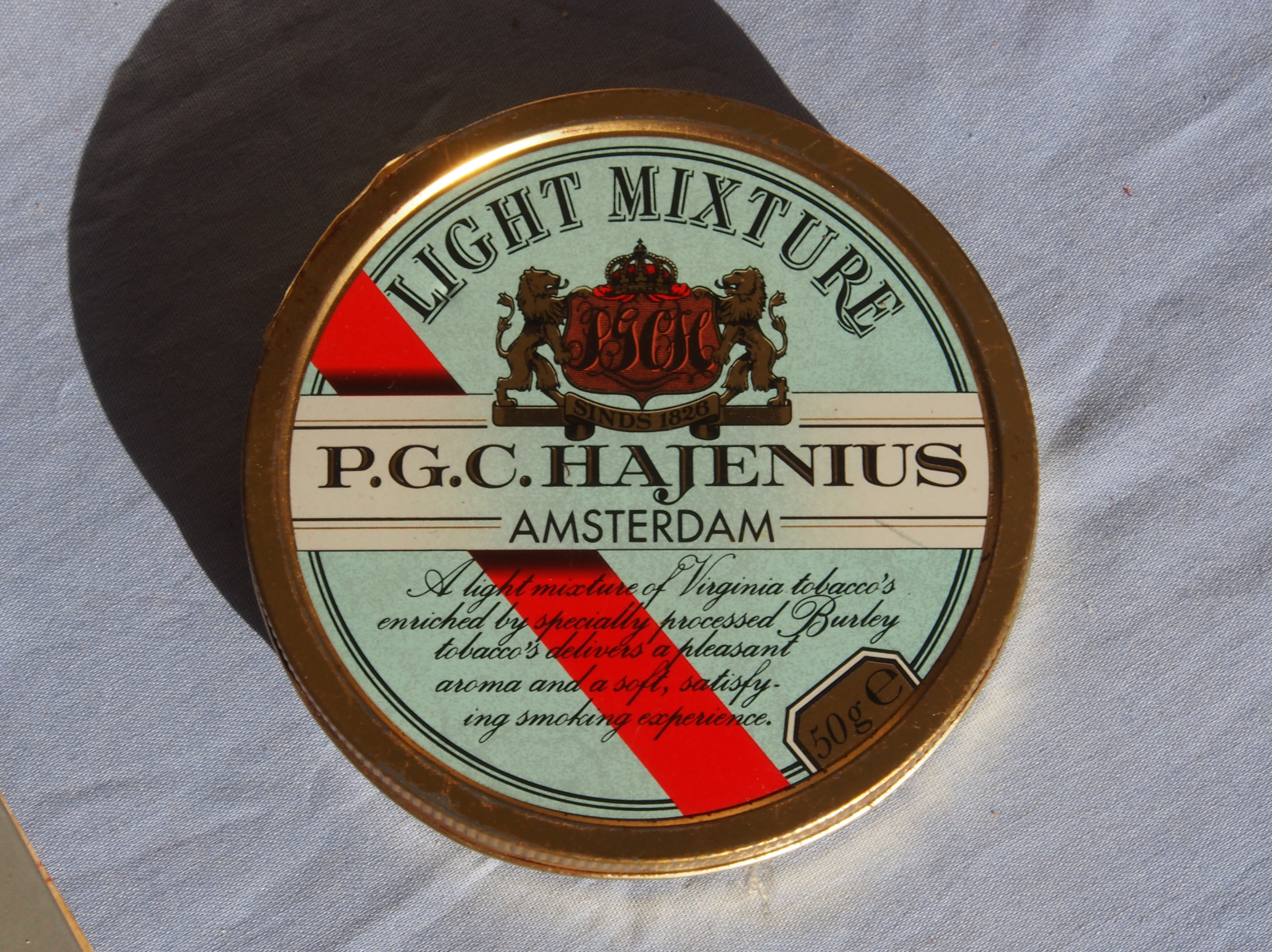 PGC Hajenius Amsterdam, Light mixture